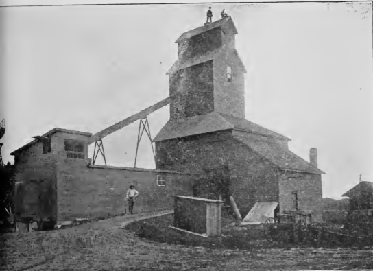 Kansas, USA